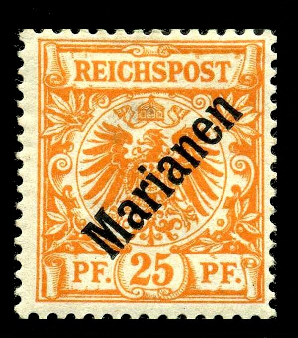 Estampilla Alemana de La Islas Marianas de valor facial 25pf del año 1899 color naranja con resello que indica Marianen